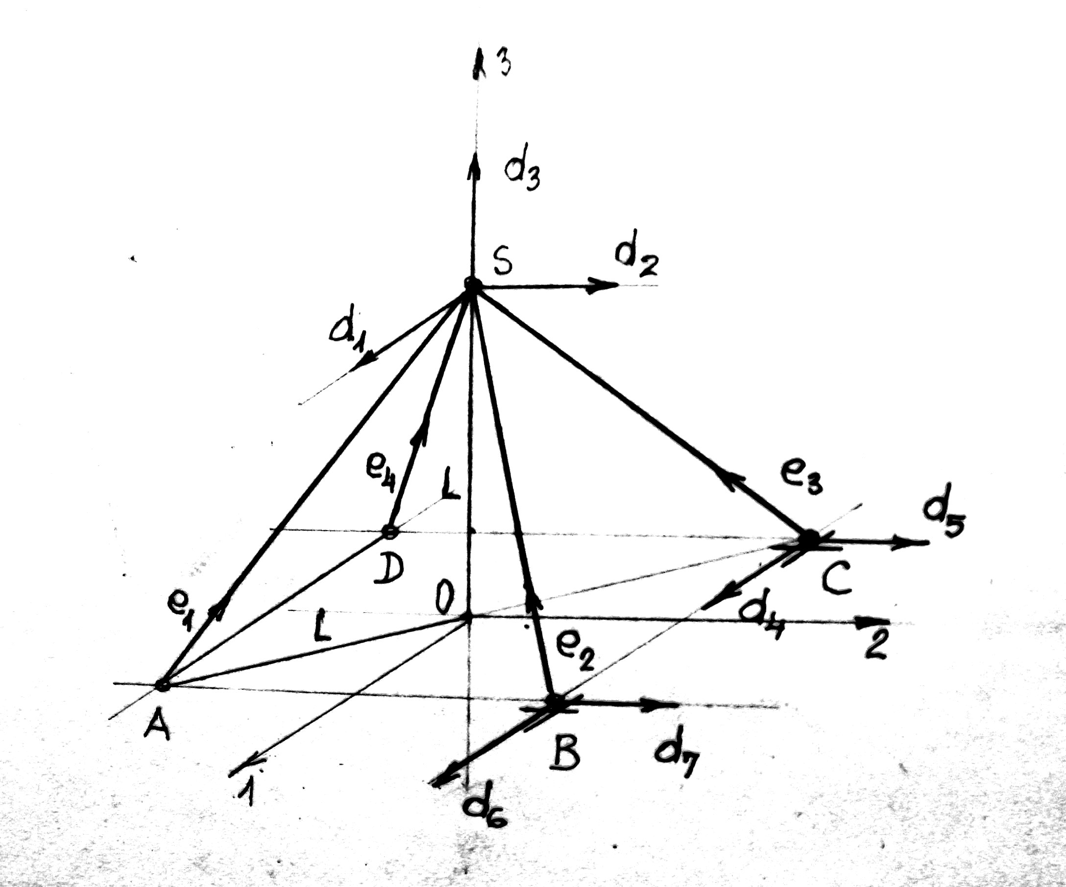 Analiza ruchliwości łańcucha przestrzennego